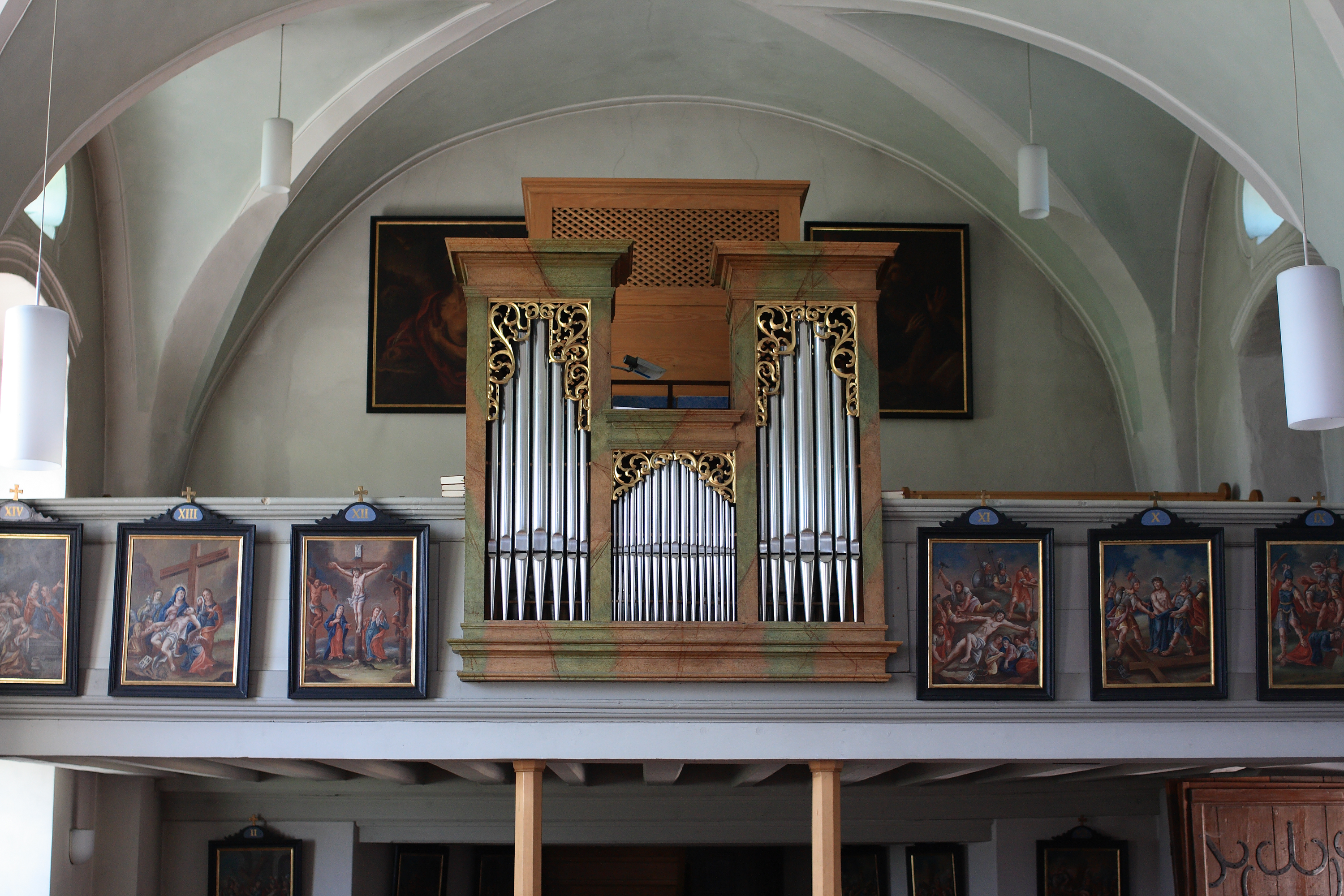 Die Orgel der Leonsteiner Pfarrkirche.